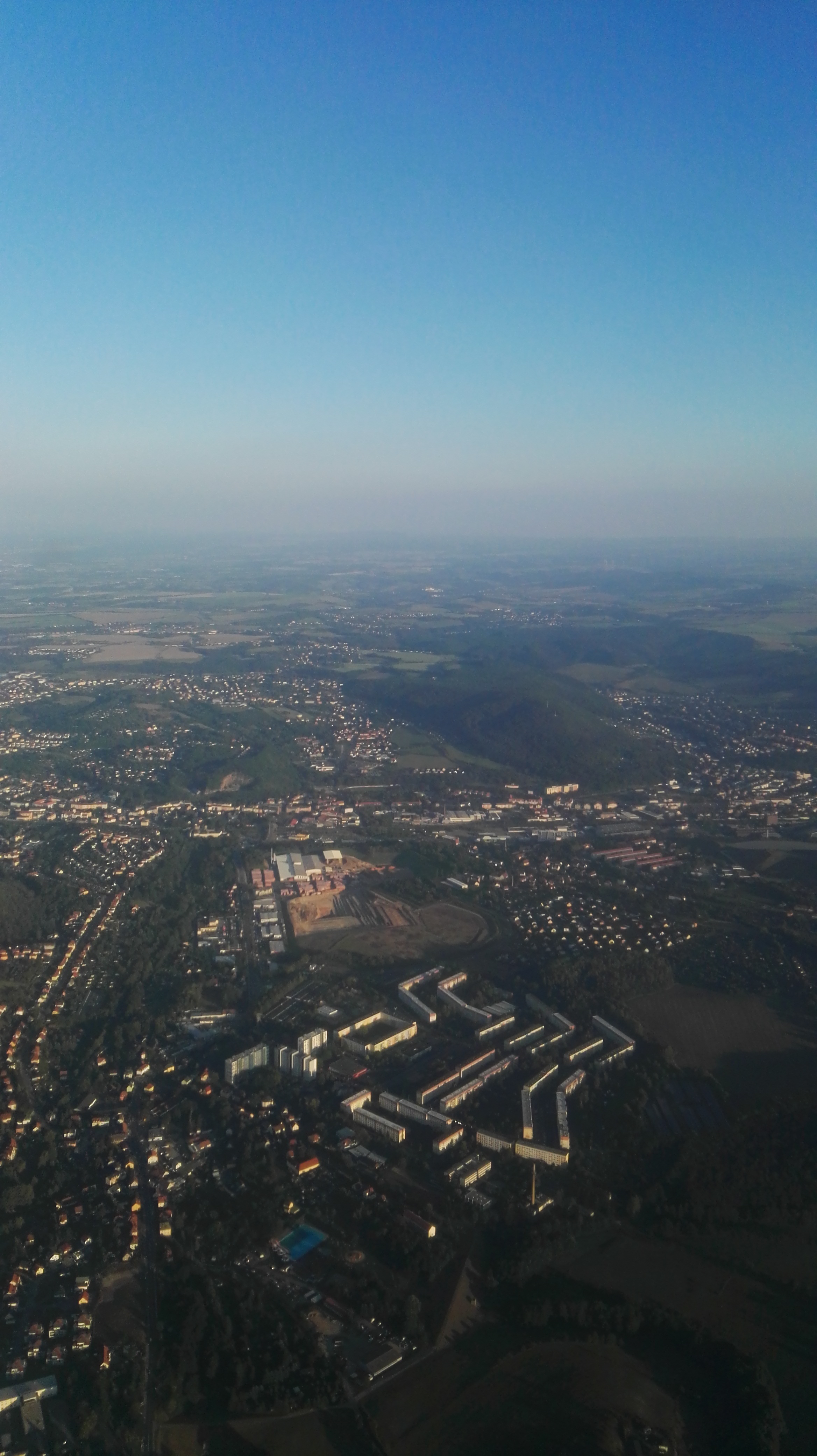 Luftaufnahme von Dresden